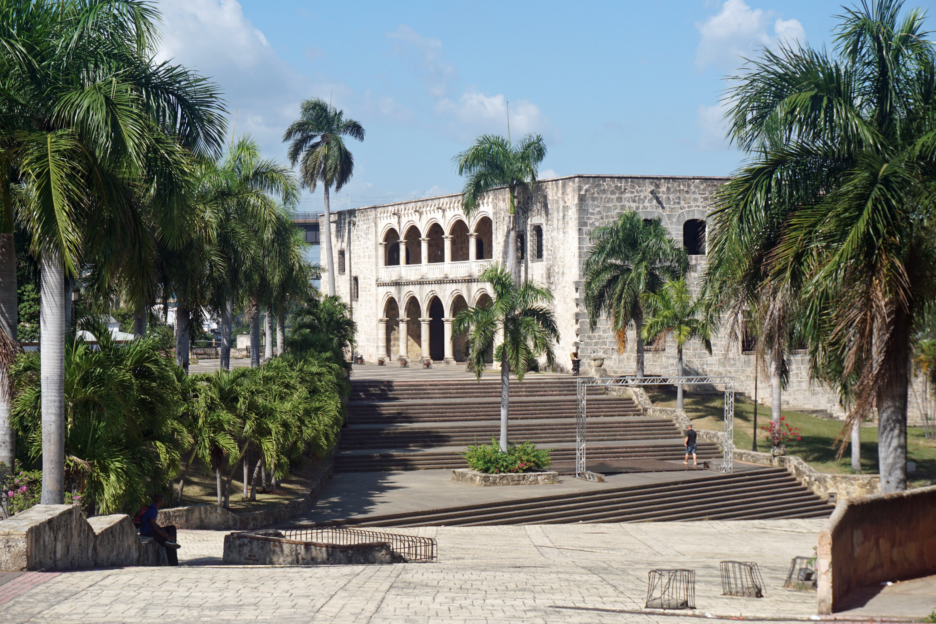 Alcázar de Colón y Plaza España, Ciudad Colonial de Santo Domingo, RD.